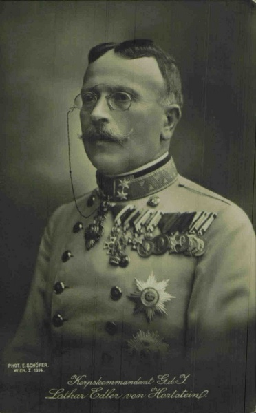 Lothar Edler von Hortstein (1855-1944), Austrian-Hungarian general